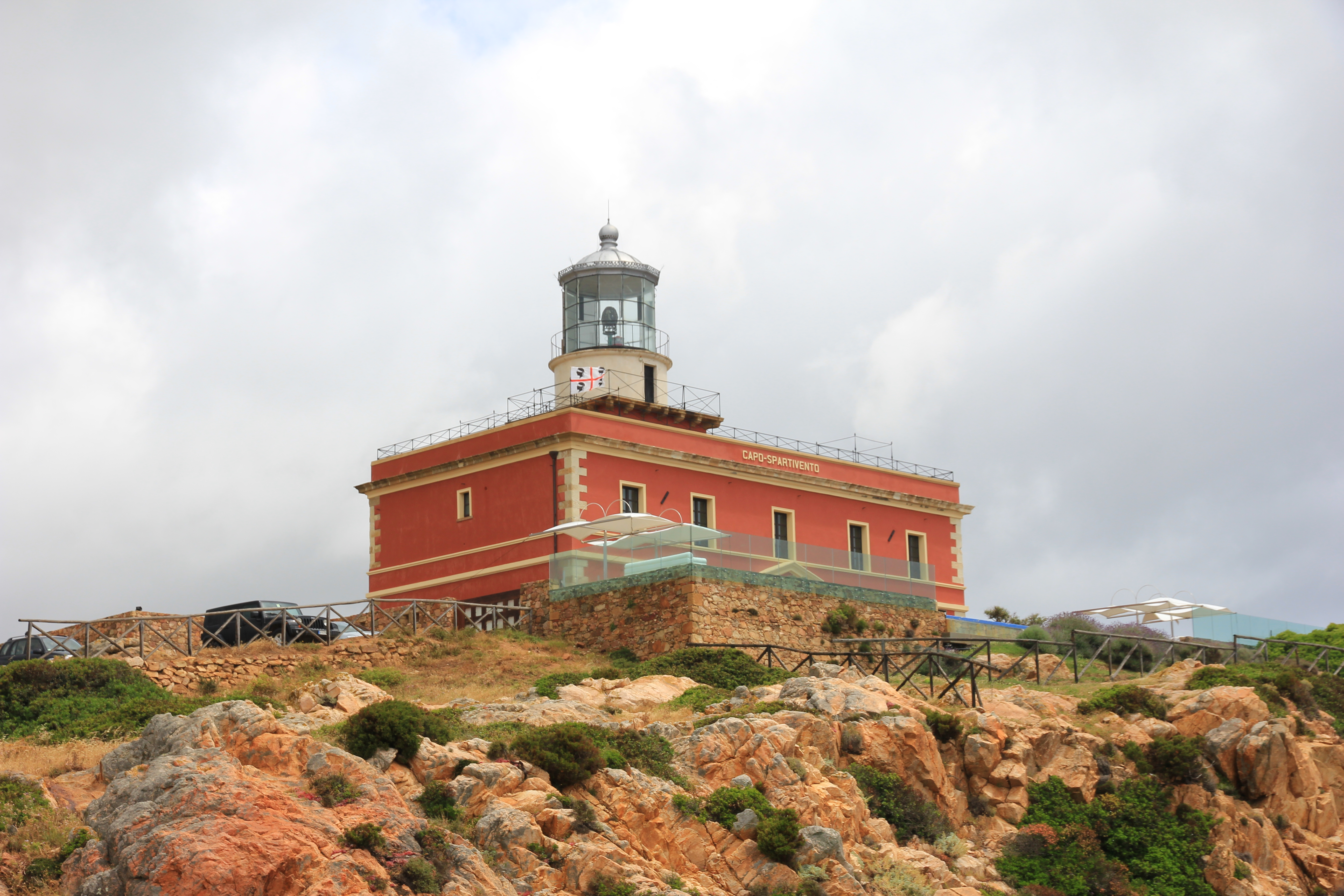 Domus de Maria - Faro di Capo Spartivento